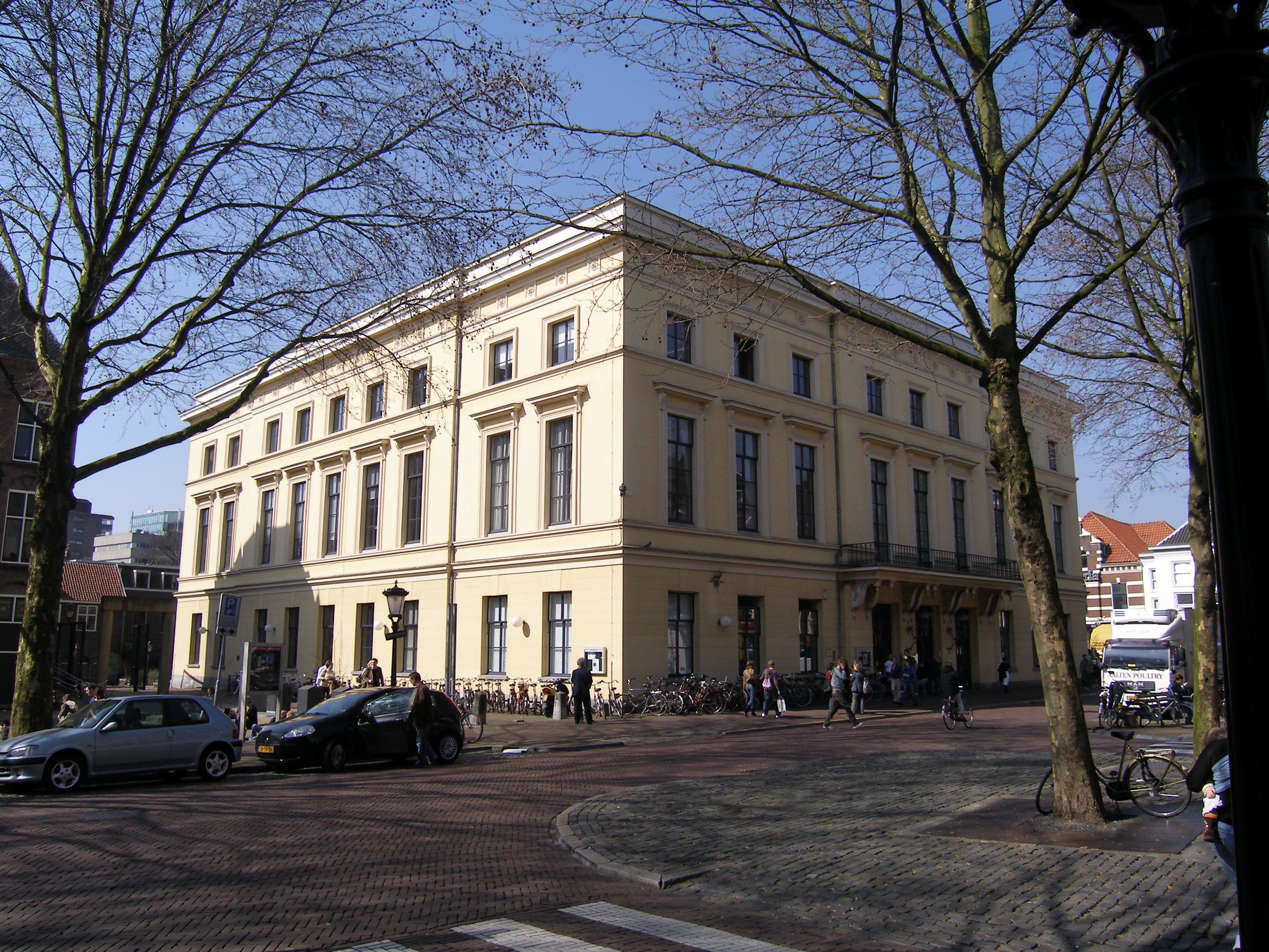 Jan van Maurik (architect). Gebouw voor Kunsten en Wetenschappen, Utrecht.